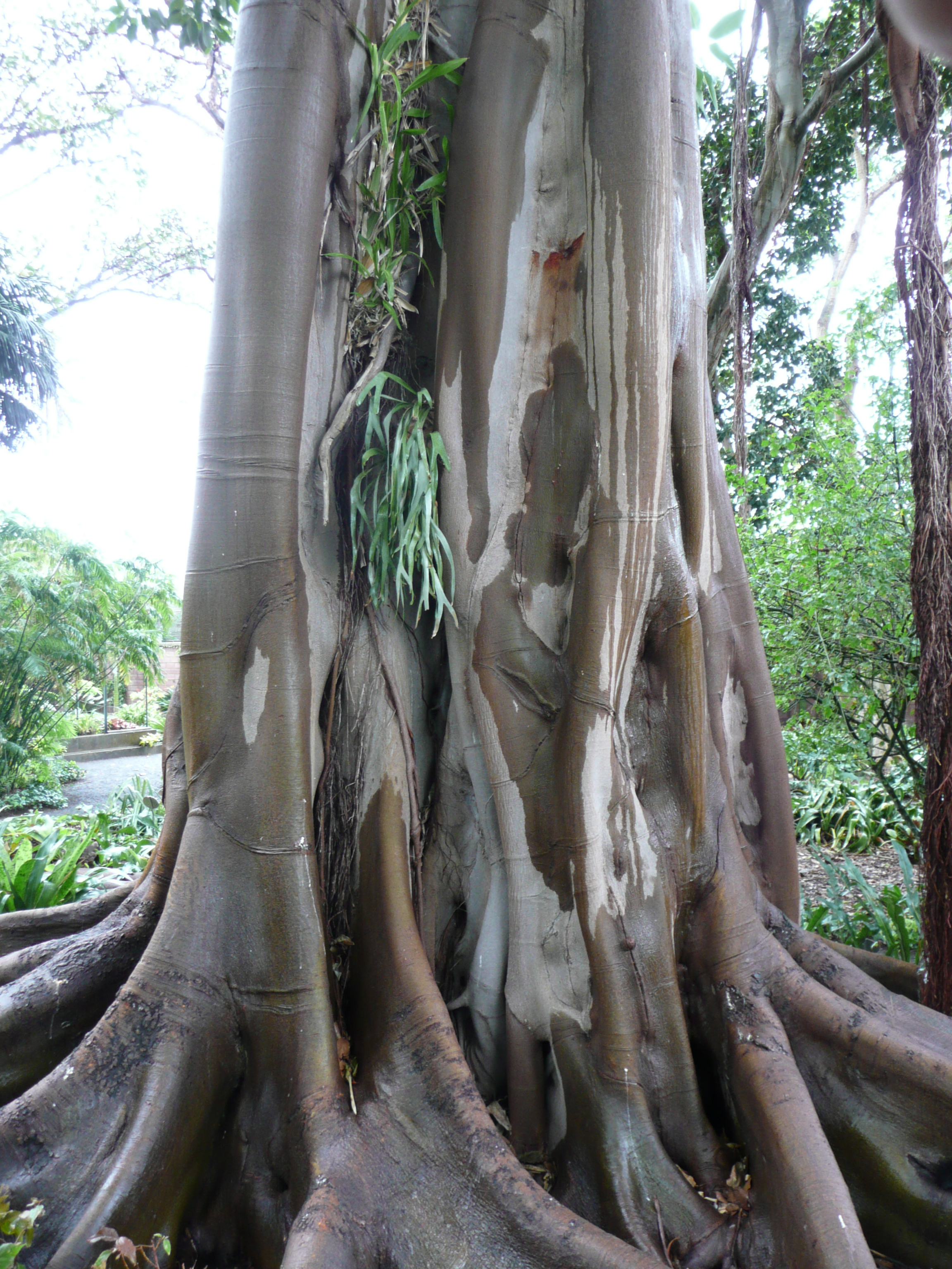 Ficus columnaris in Jardín de Aclimatación de la Orotava Map: 28° 24' 39" N, 16° 32' 7" W